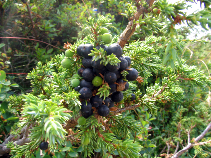 Kleka sa Biogradske gore